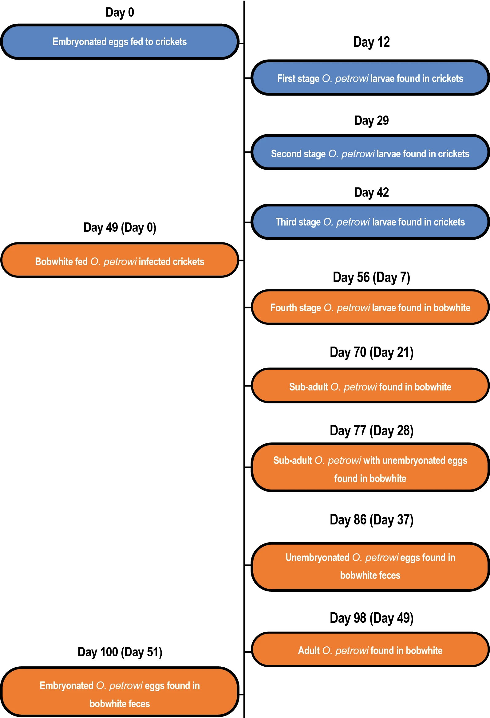 Chronologie du cycle de vie complet d'Oxyspirura petrowi. La durée passée au sein de l'hôte intermédiaire, le grillon domestique (Acheta domesticus) et l'hôte définitif, le colin de Virginie (Colinus virginianus), sont notées respectivement en bleu et orange.